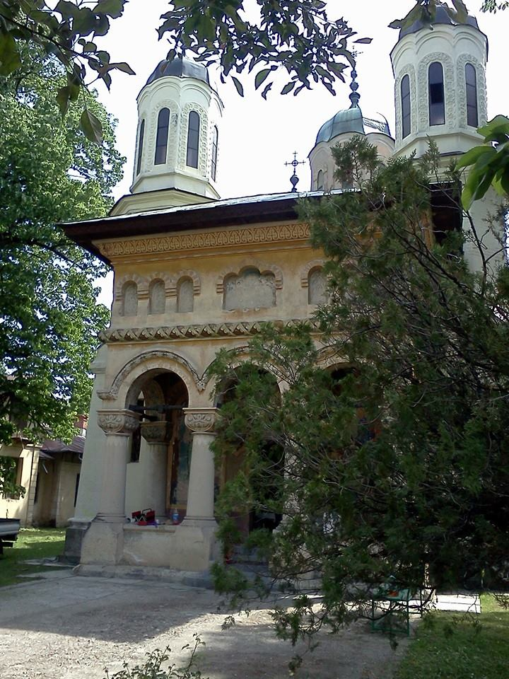 Biserica „Adormirea Maicii Domnului ”